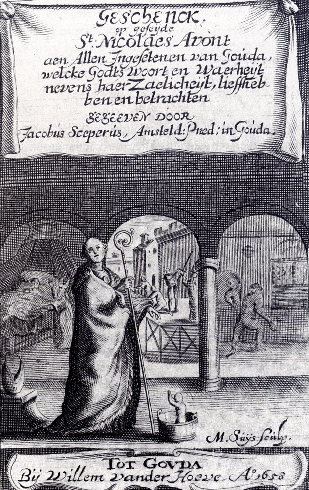 Titelblad van Geschenck, op geseijde St. Nicolaes avont enz. door Jacobus Sceperus (1607-1677)